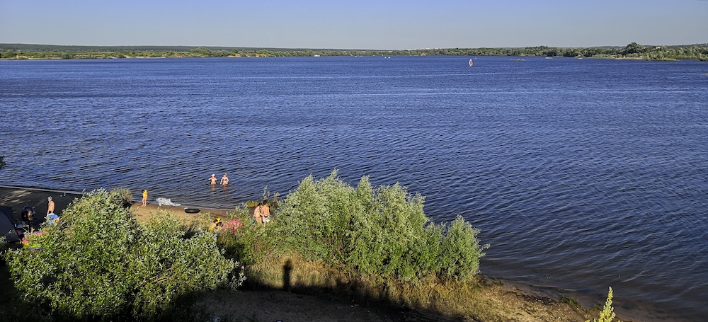 Озеро Павленское (Цимлянка), расположено в Московской области, городской округ Серпухов